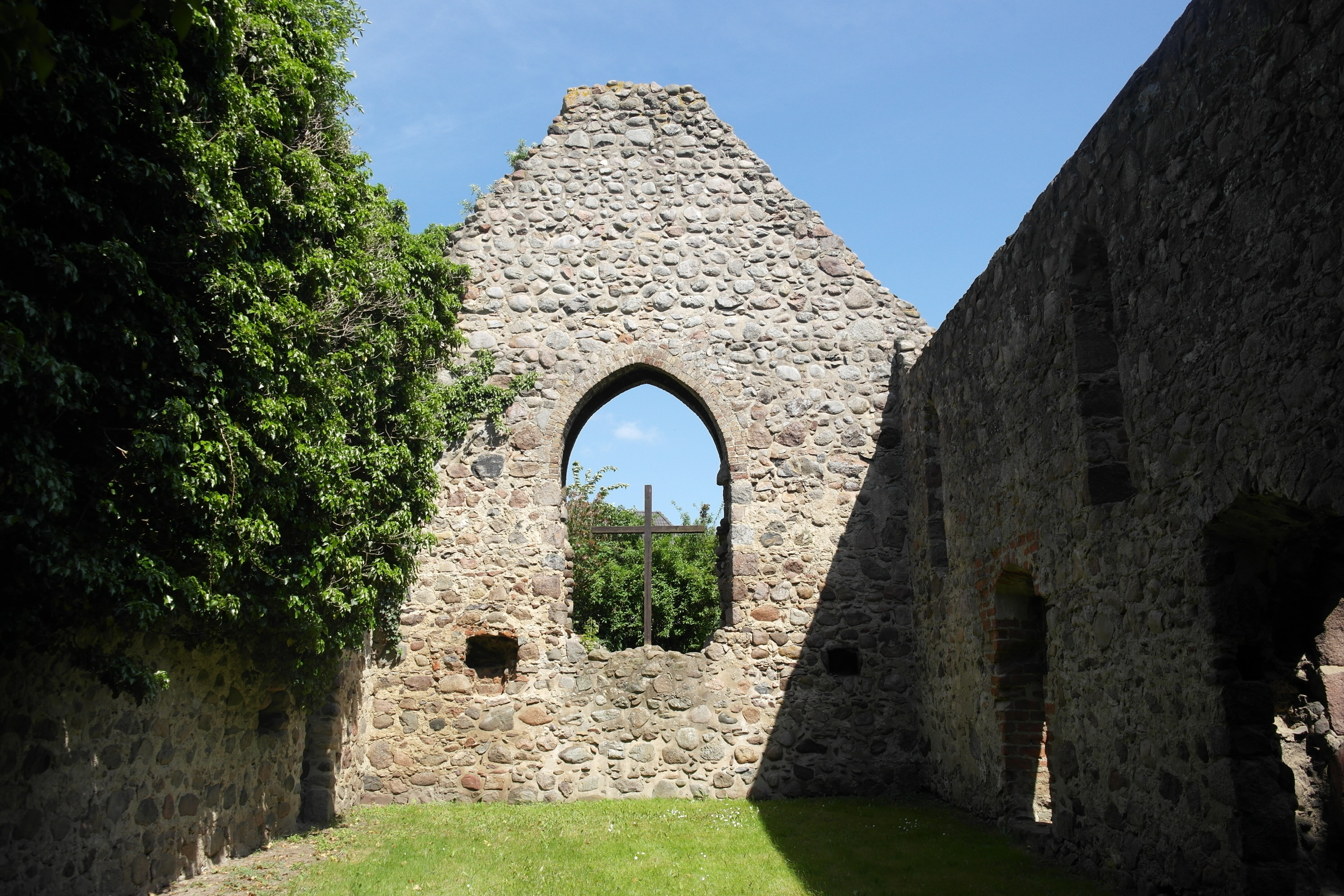 Kirchenruine Küssow im Osten von Neubrandenburg